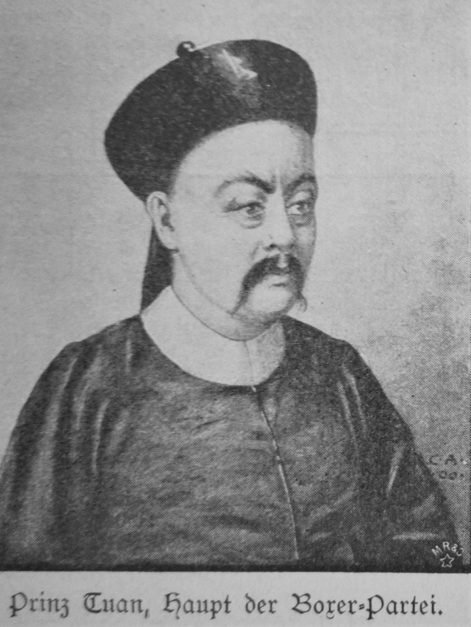 Prinz Zaiyi Tuan, Führer der Boxerpartei in China